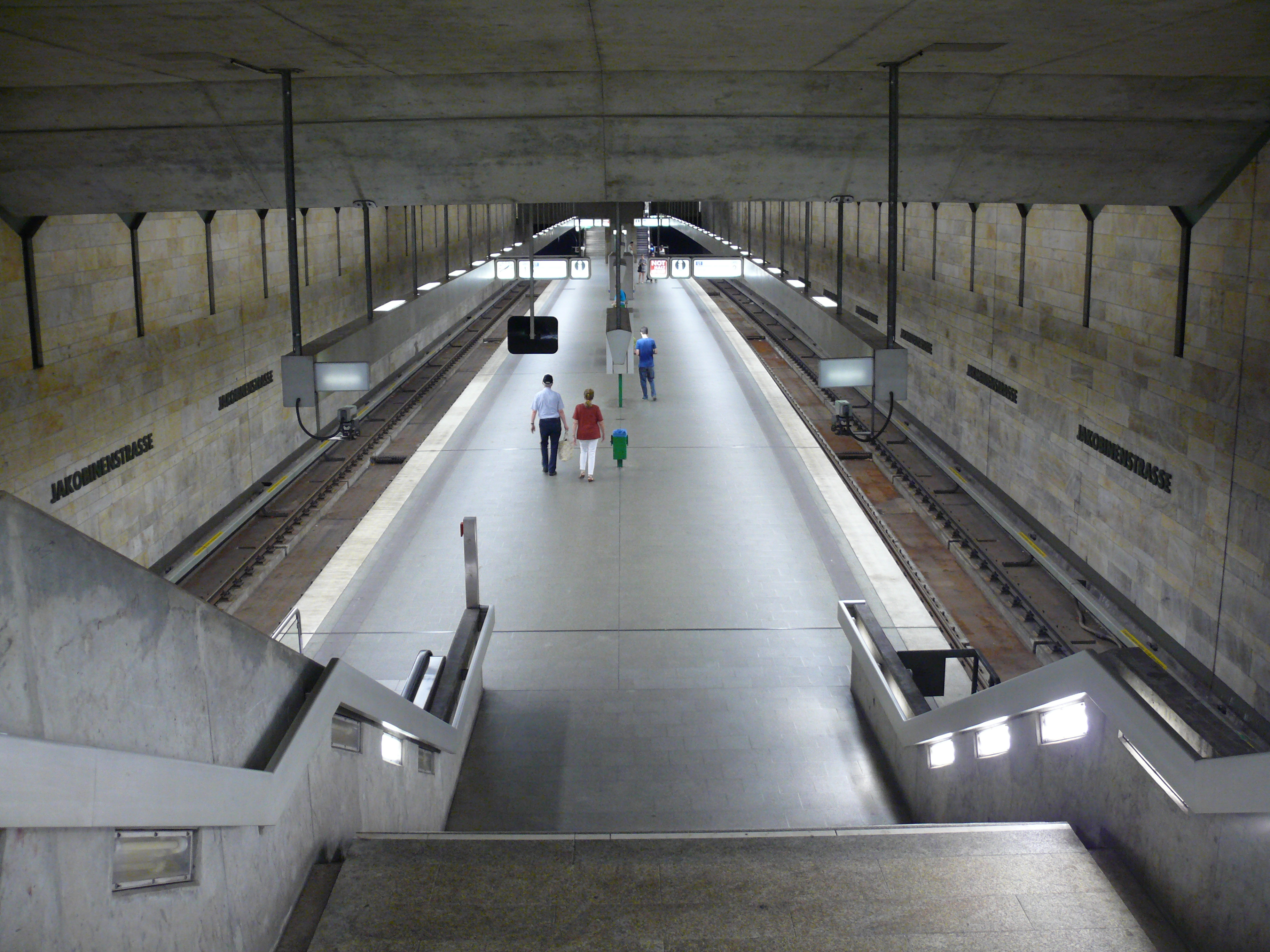 Blick auf die Bahnsteigebene am U-Bahnhof Jakobinenstraße in Fürth.